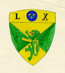 Stemma della famiglia Tornabuoni